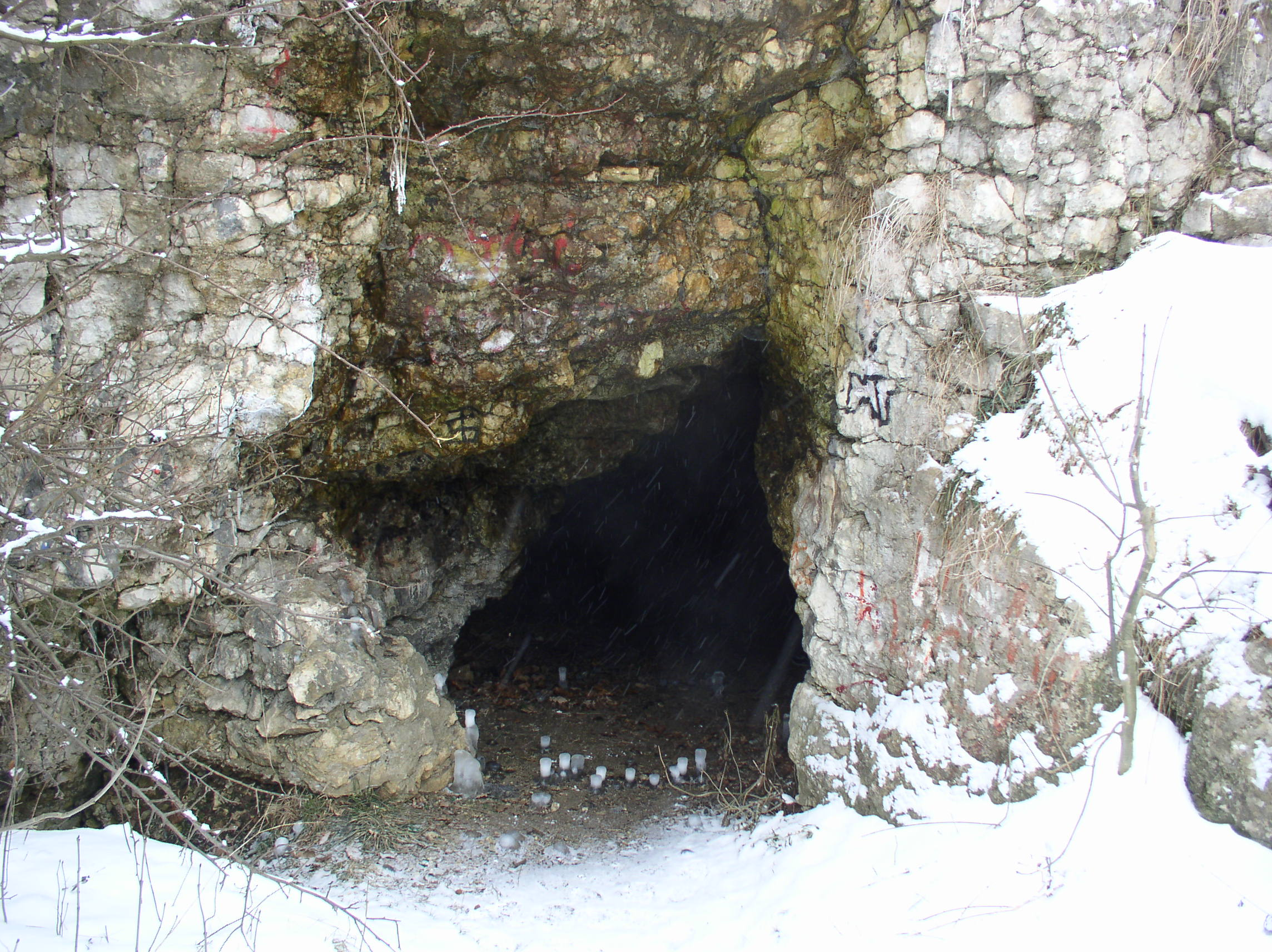 Wejście do Jaskini Twardowskiego